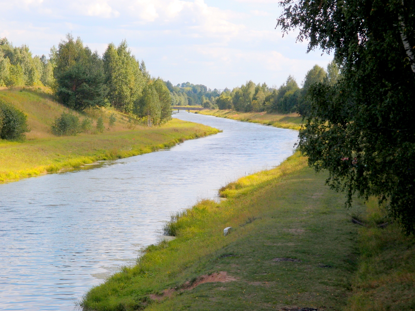 Janka Kupala memorial in Viazynka, Belarus.